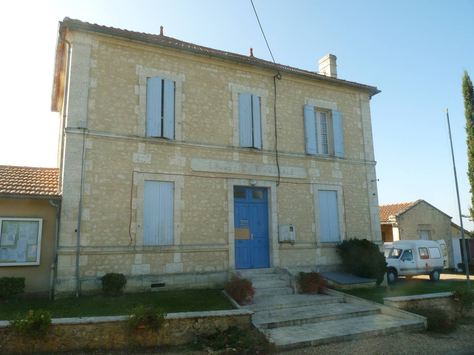 mairie de Bazac (16), France